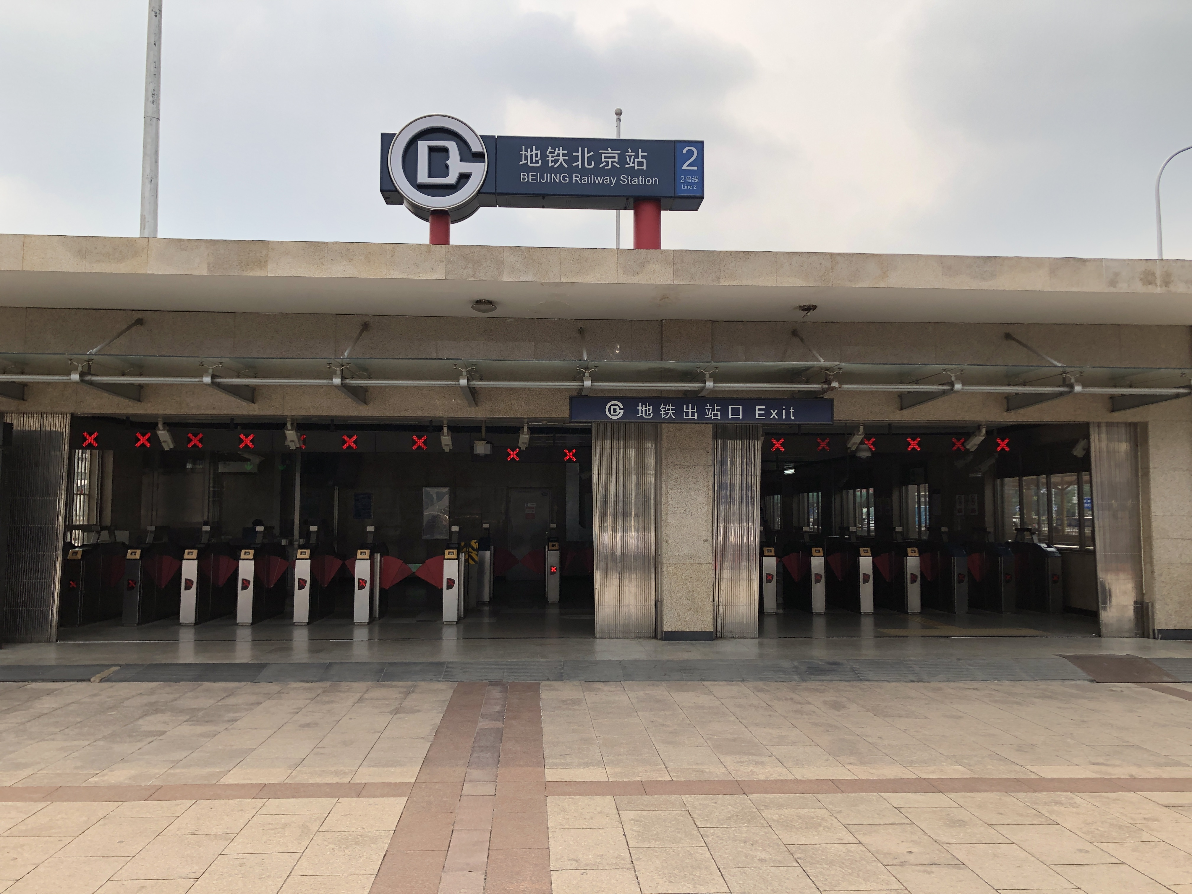 中文（中国大陆）: 北京地铁北京站C口